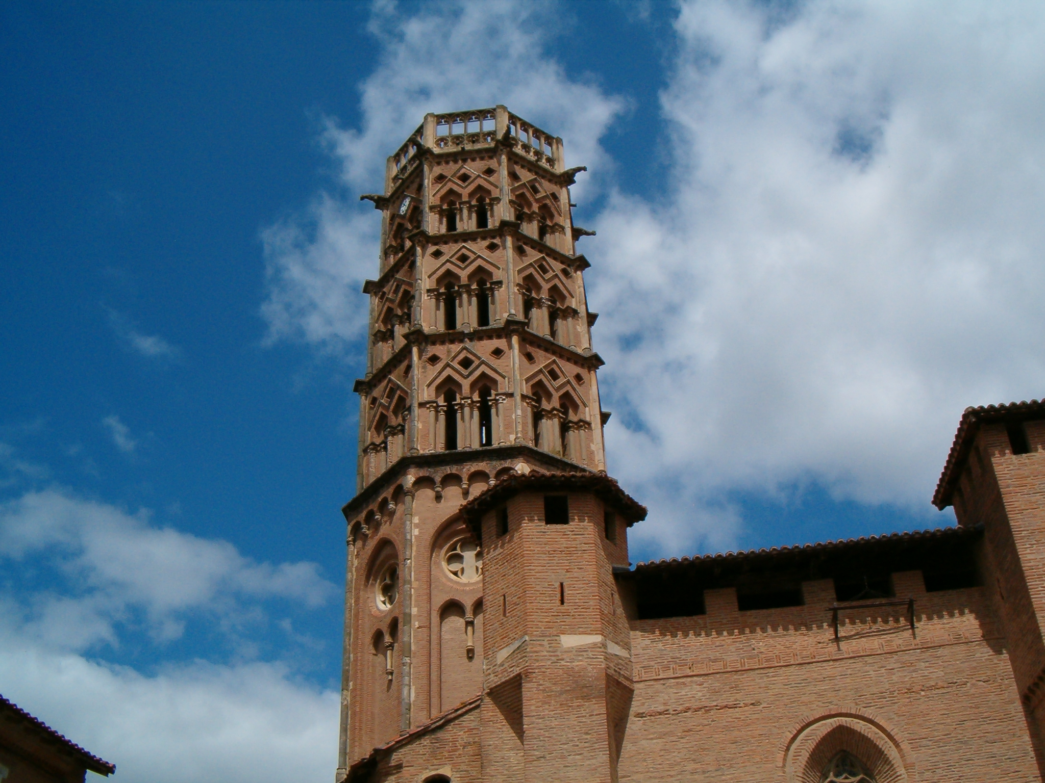 Beffroi de la cathédrale de Rieux-Volvestre